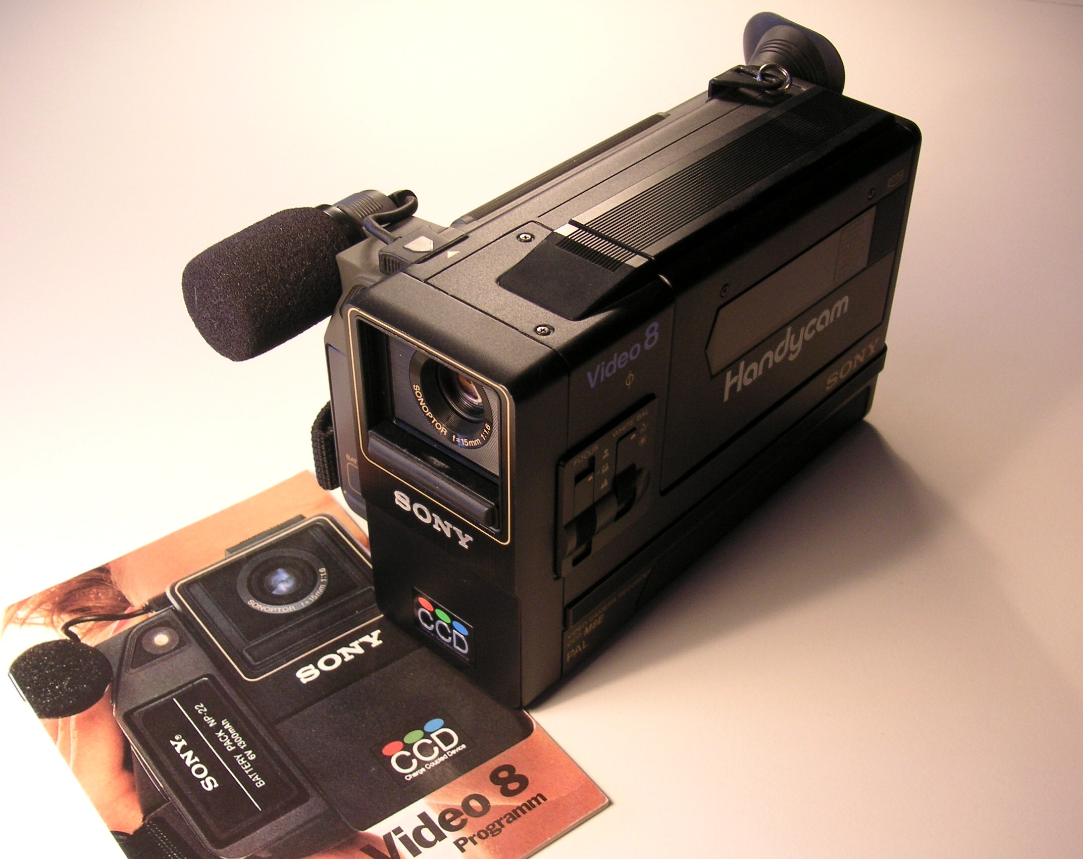 1985 Sony Video 8 camera CCD-M8E